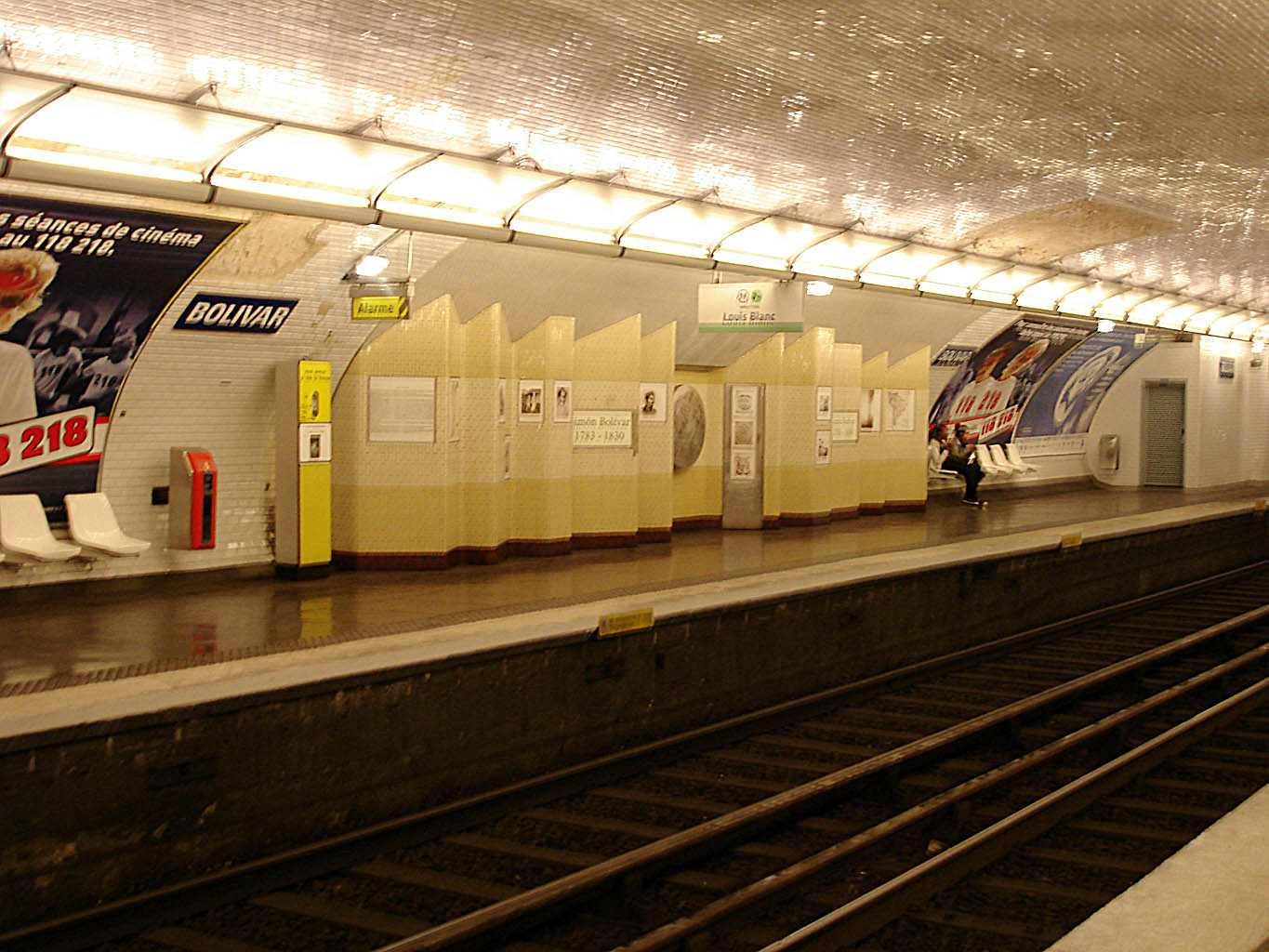 Station Bolivar, de la ligne 7bis du métro de Paris, France.